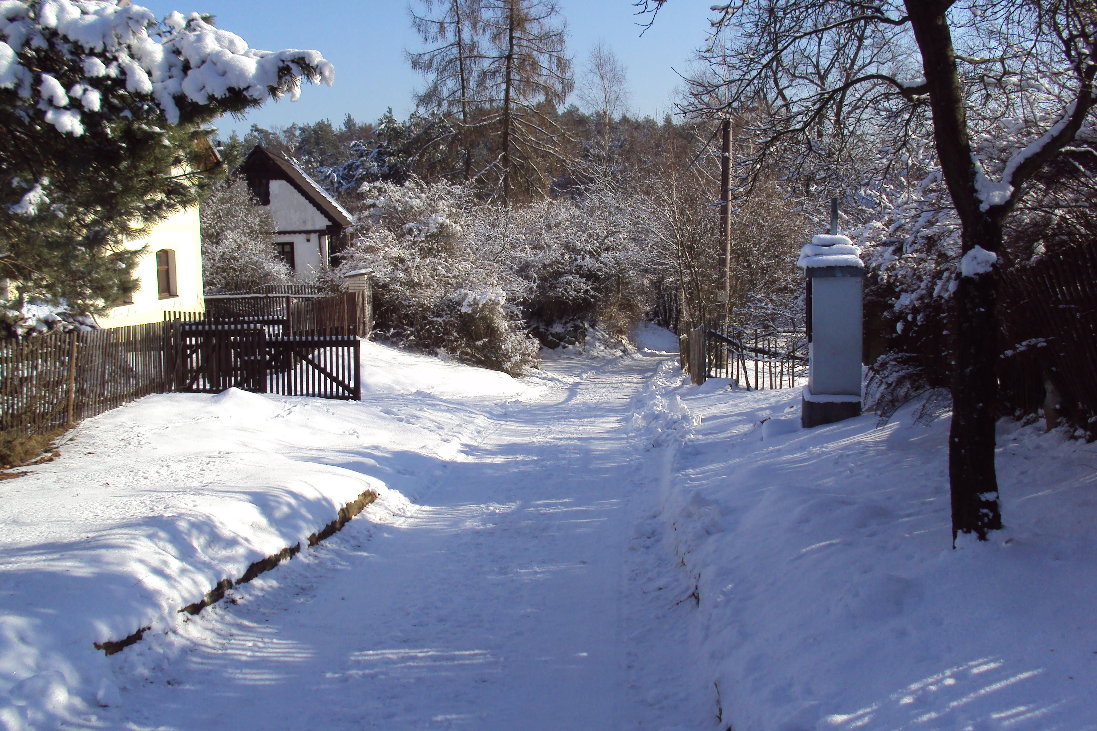 Vesnička Nedvězí u Dubé